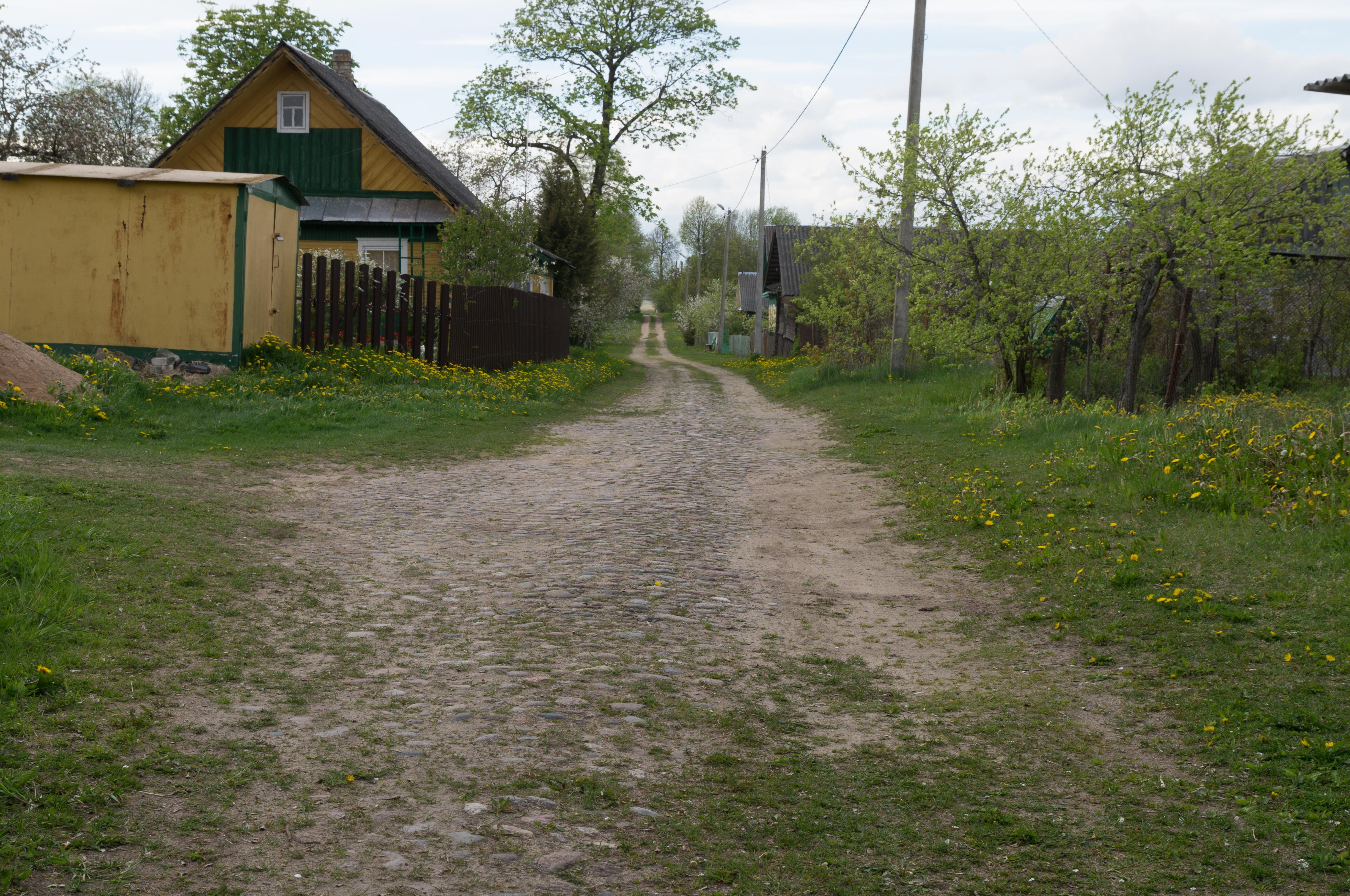 Брукаваная вуліца ў Кабыллі (ці па-сучаснаму - у Кастрычніцкай, Акцябрскай)